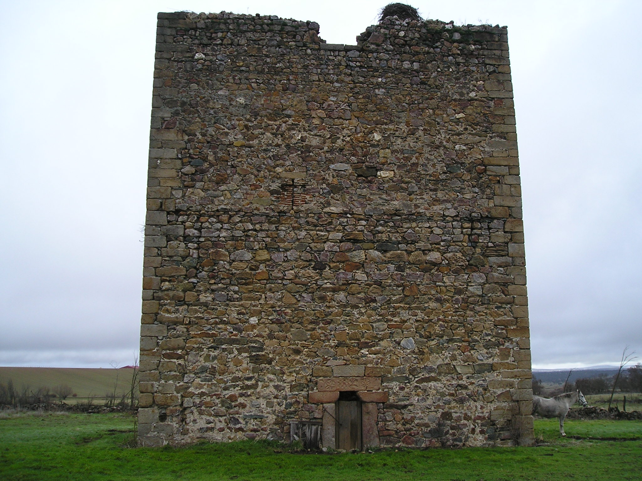 Frontal del Torreón de Tamames